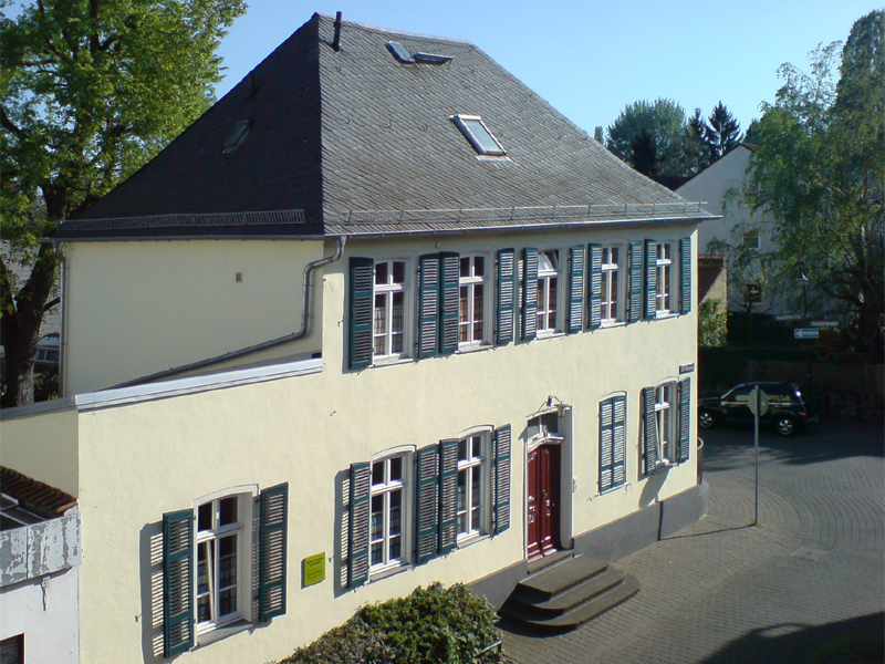 Ev. Pfarrhaus Frankfurt am Main - Hausen